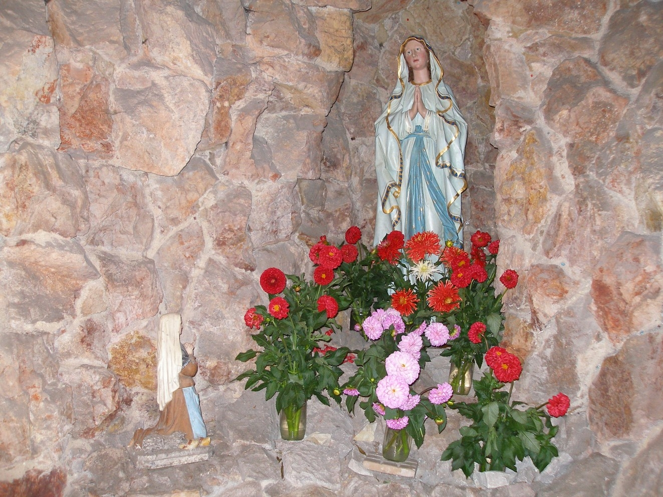 Panenka Marie